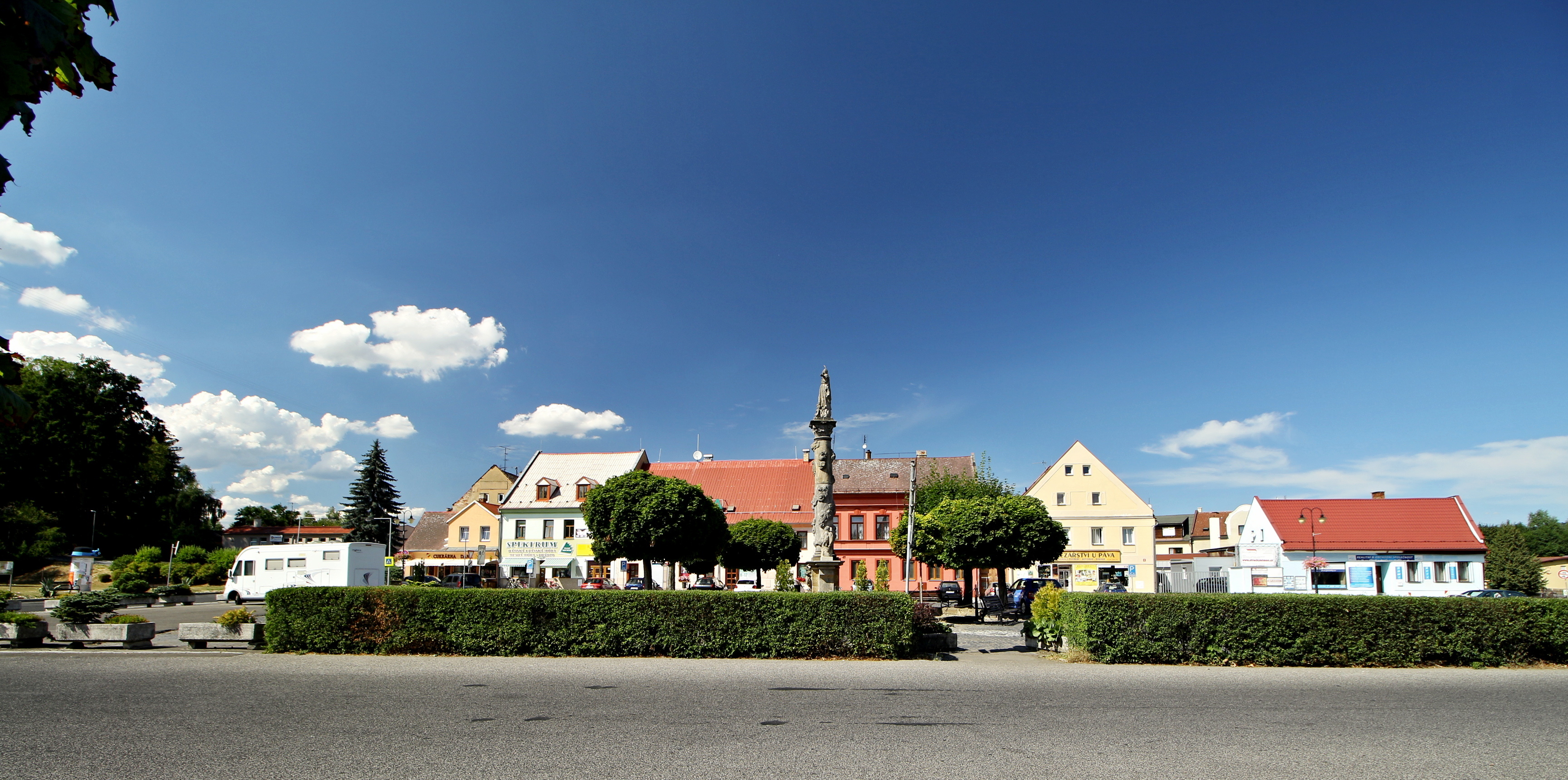 Náměstí 1. máje se sloupem Panny Marie v Mimoni